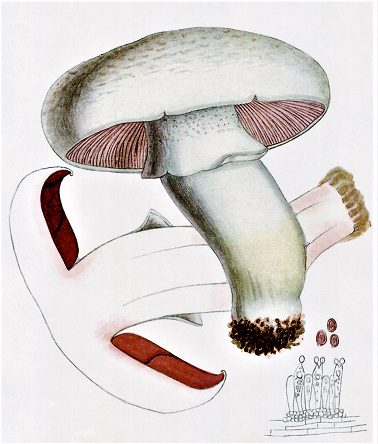 Giacomo Bresadola: Psalliota campestris L., 1753) Quél. (1872), heute Agaricus campestris L. (1753)